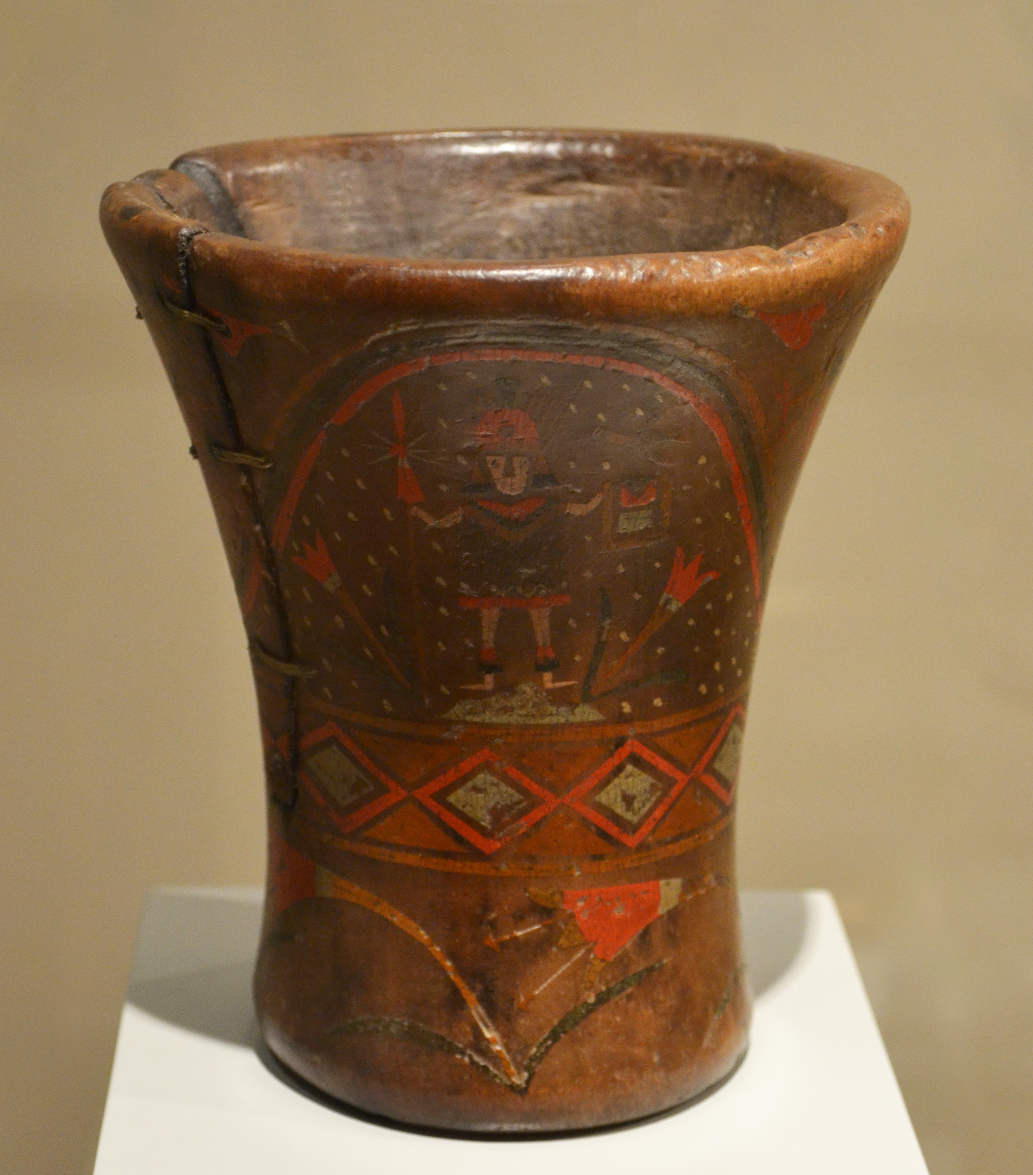 Quero o vaso ceremonial troncocónico, con decoración pictórica distribuida en tres bandas. La superior, representa dos cabezas de jaguar de las que brotan arcoíris, motivoque sirve de marco, a la figura de un guerrero en pie entre dos flores de "kantu". Sobre cada cabeza de jaguar aparece una mujer entre dos aves y dos flores. La faja intermedia, se adorna con motivos geométricos de "tocapus" y la inferior, con flores de "kantu". Material: Madera, pigmento y resina. Altura: 16,50 cm. Boca: Diámetro máximo: 14 cm. Nº inv. 07537. Museo de América.